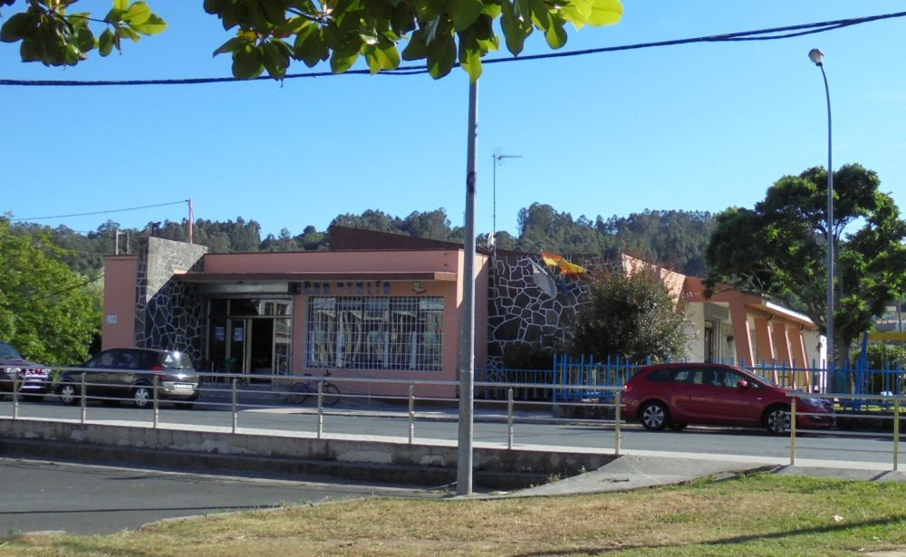 Sede social del Círculo Cultural Recreativo y Deportivo Perlío (C.C.R.D. Perlío)